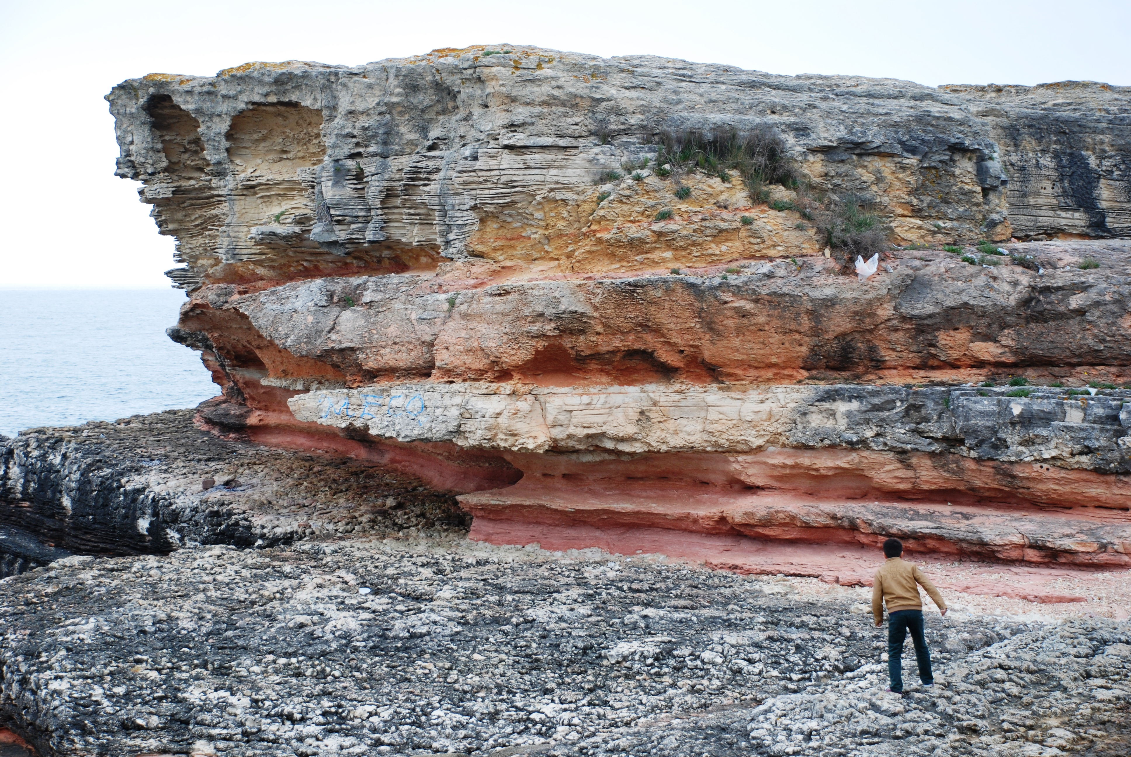 Kandıra, Kefken kıyılarında Osmanlılar zamanında taş ocağı olarak kullanılan alan.